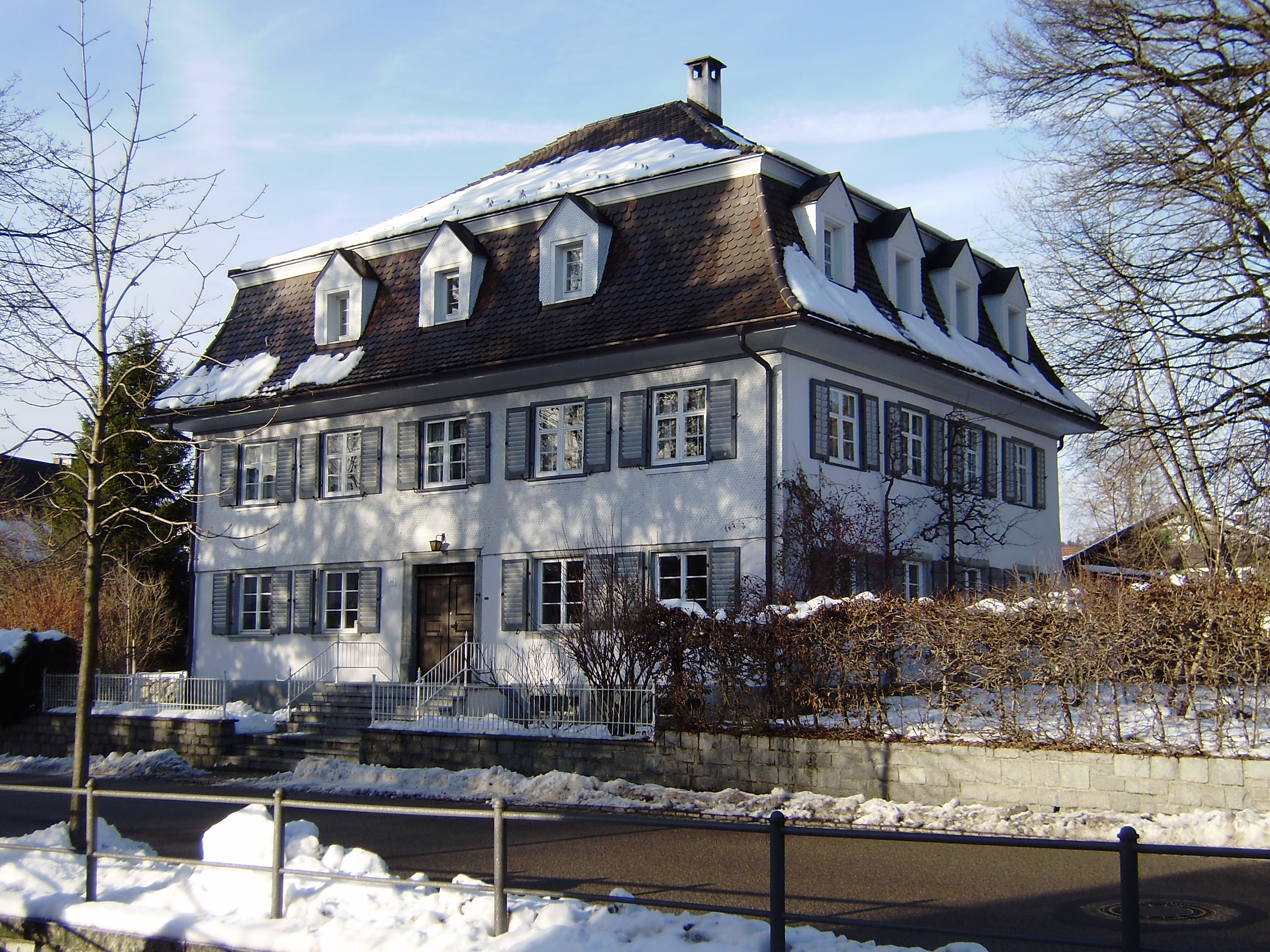 Villa Hummel in Weiler im Allgäu, Bayern, Deutschland